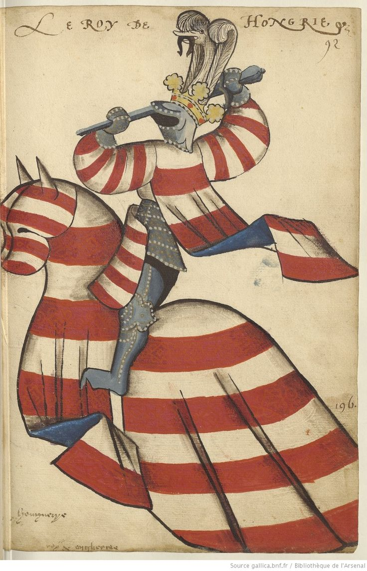 Grand Armorial équestre de la Toison d'or